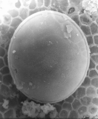 Centric diatom